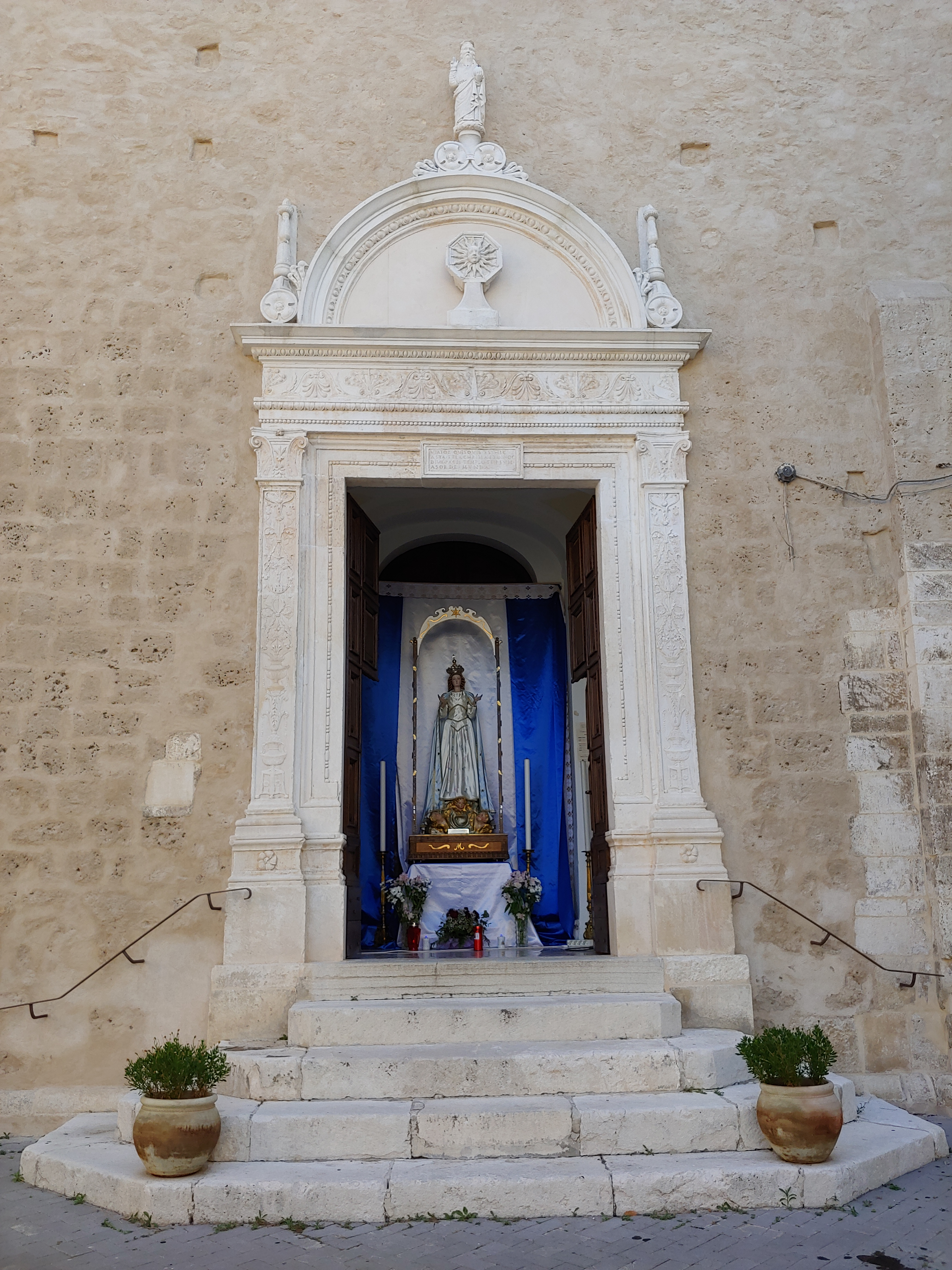 Portale medioevale della Chiesa di San Domenico in Tocco da Casauria